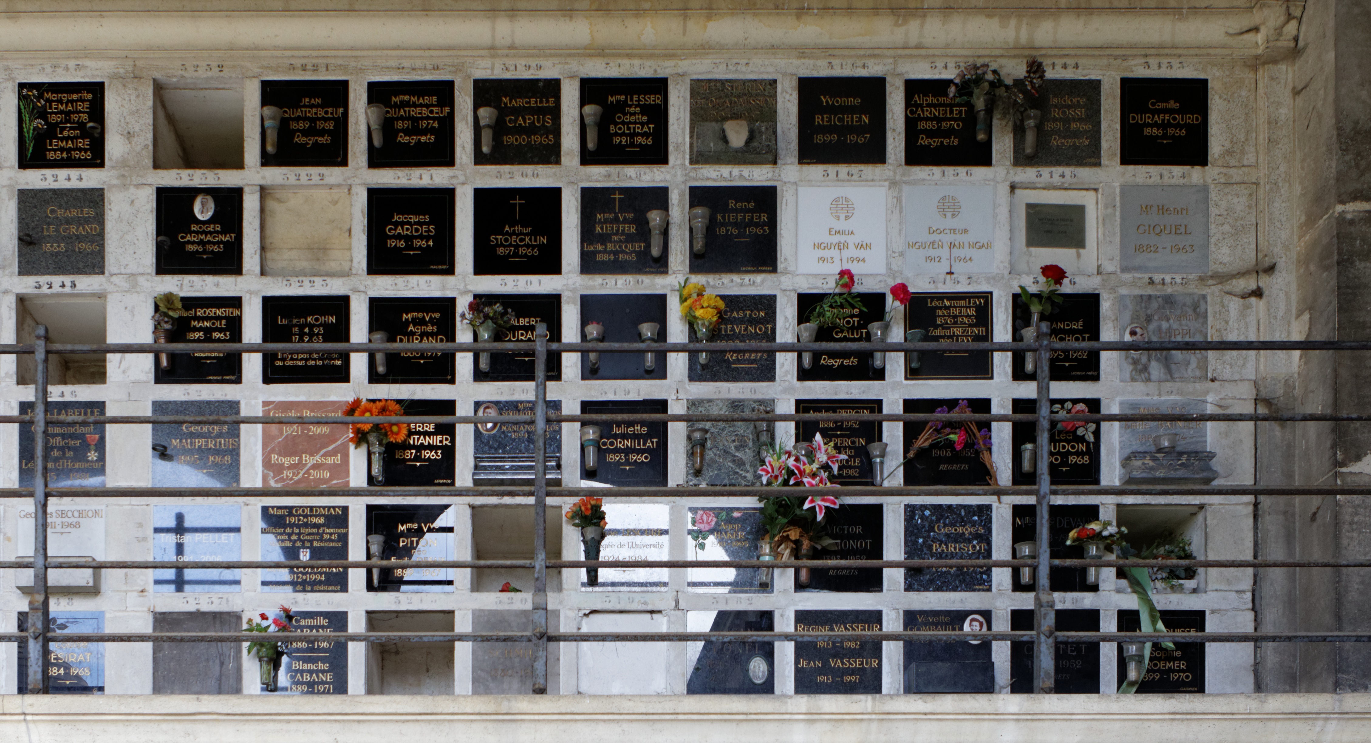 Cases du columbarium du cimetière du Père-Lachaise.